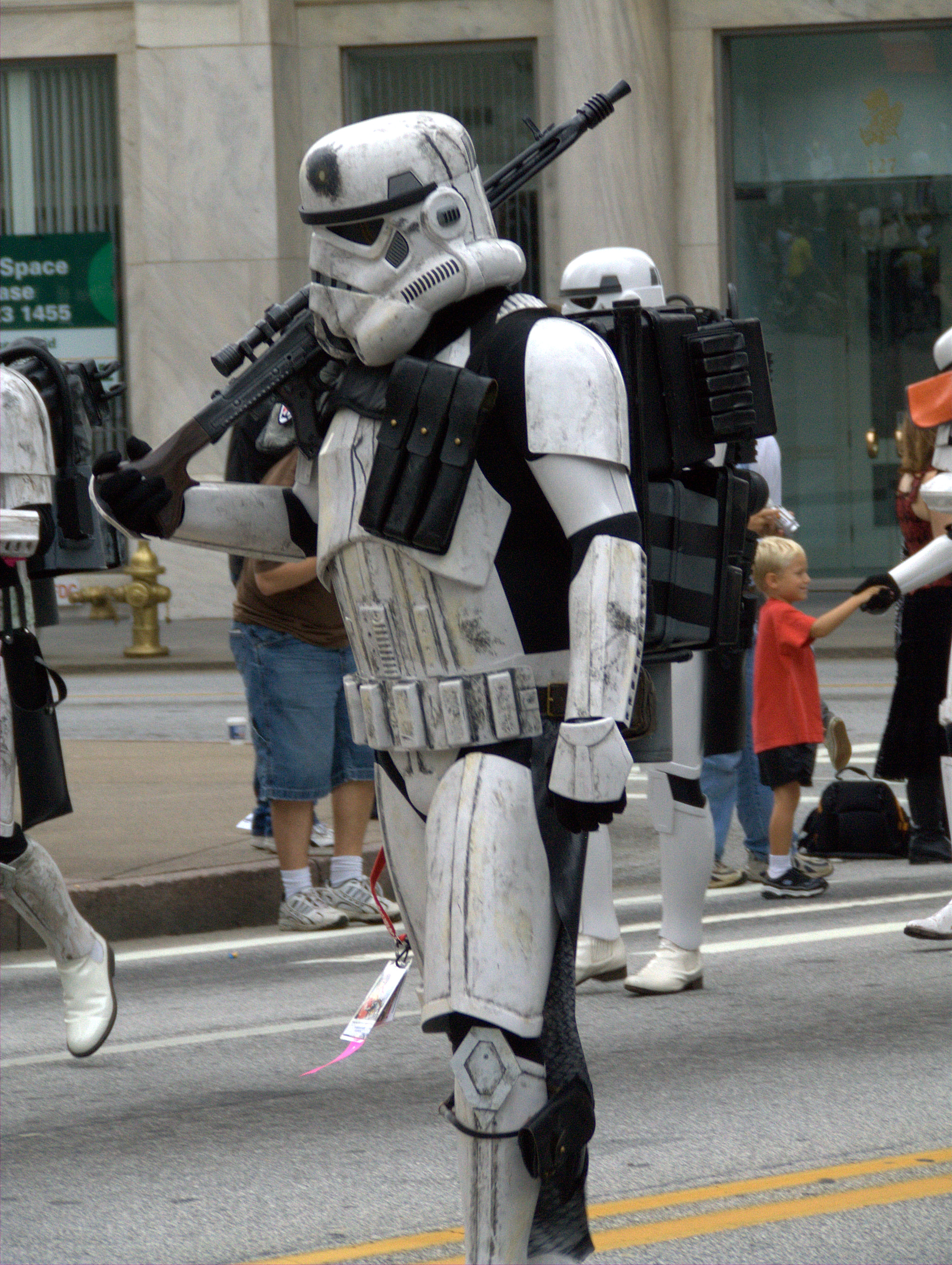 A stormtrooper veteran (Dragoncon parade, Dragoncon 2006)